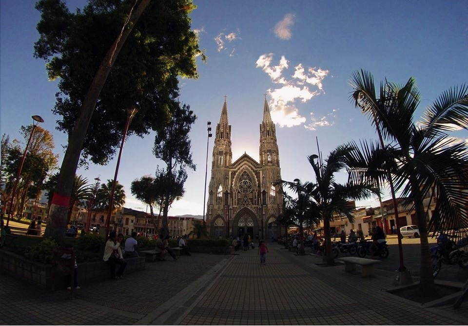 Plaza Parque Sandoná y basílica gótica